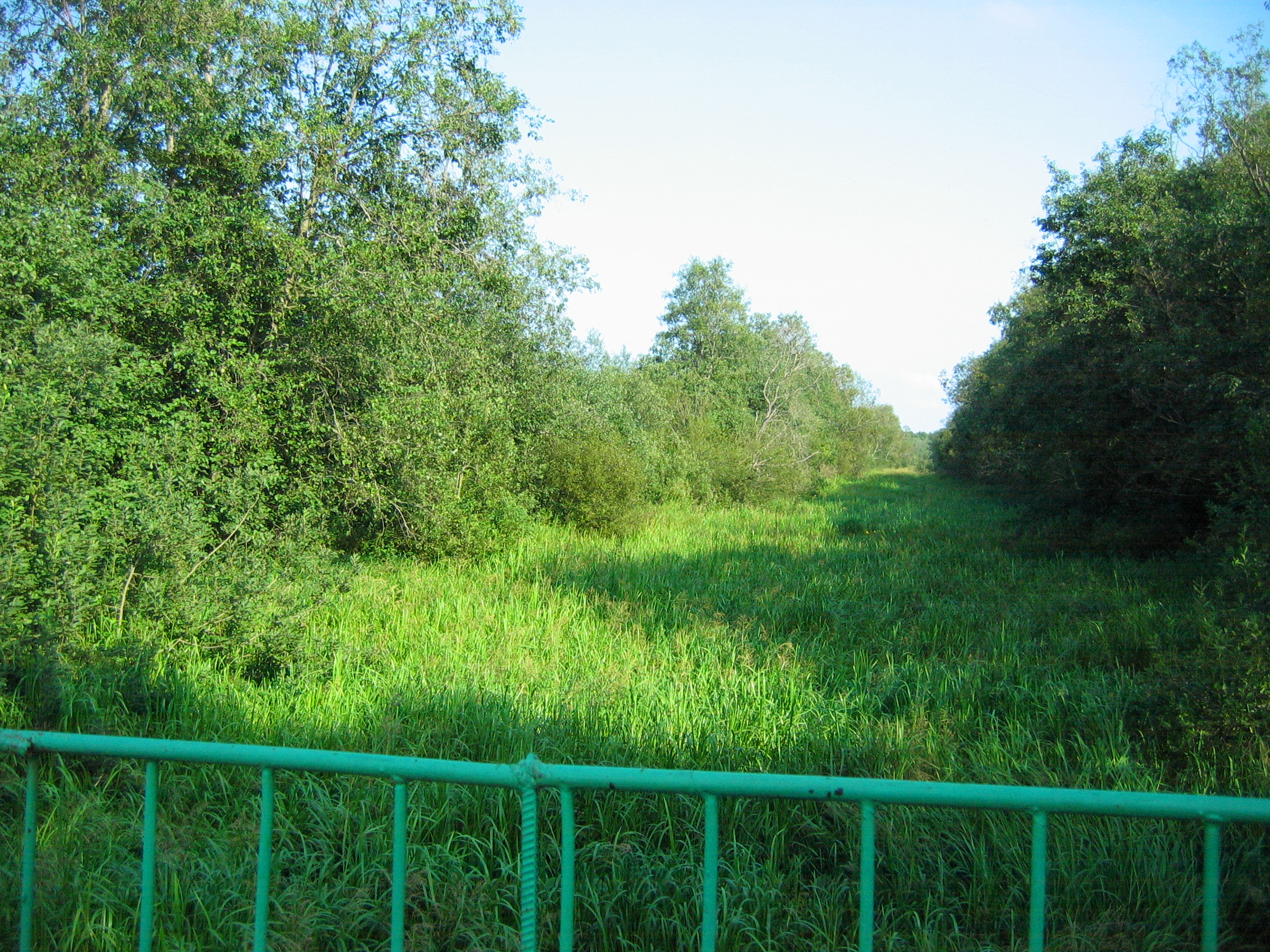 staro-ladojskiy kanal